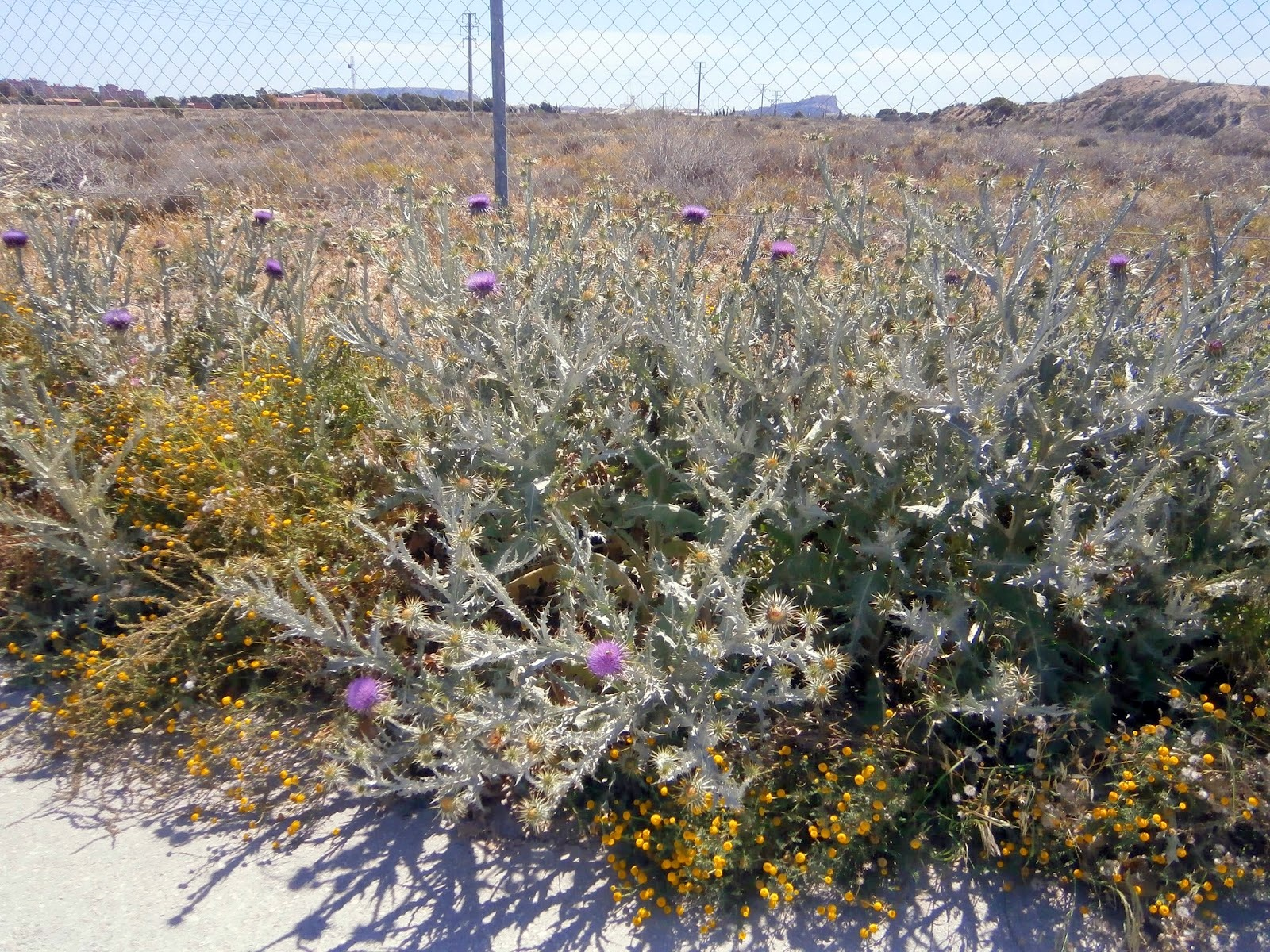 Onopordum macracanthum (Cardo borriquero) - Vista general. - Camí de la vía en Banyeres y Rabassa, Provincia de Alicante (España).